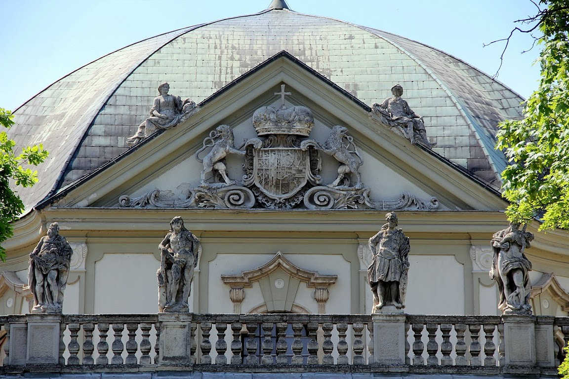 Savoyai-kastély és parkja This is a photo of a monument in Hungary. Identifier: 7285